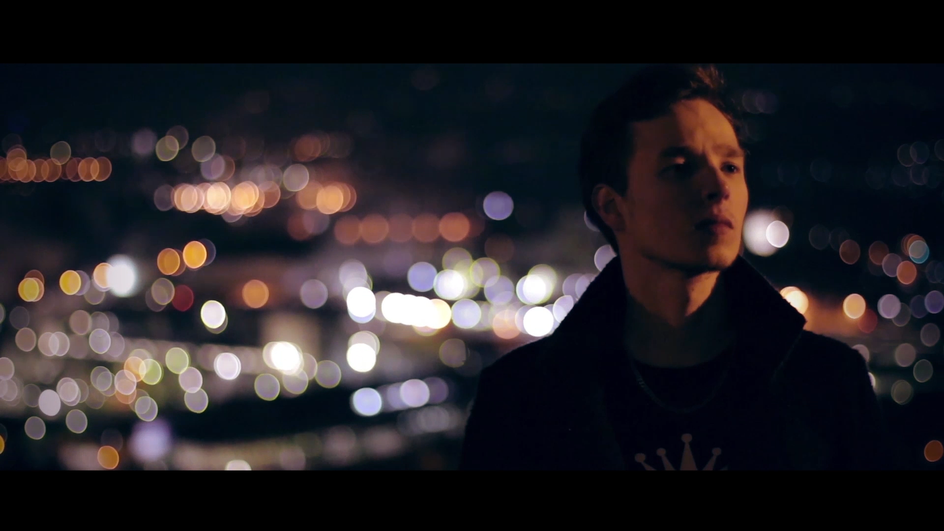 Ausschnitt aus „Crest White District Anthem“